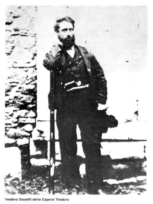 Il brigante Caporal Teodoro di Barile